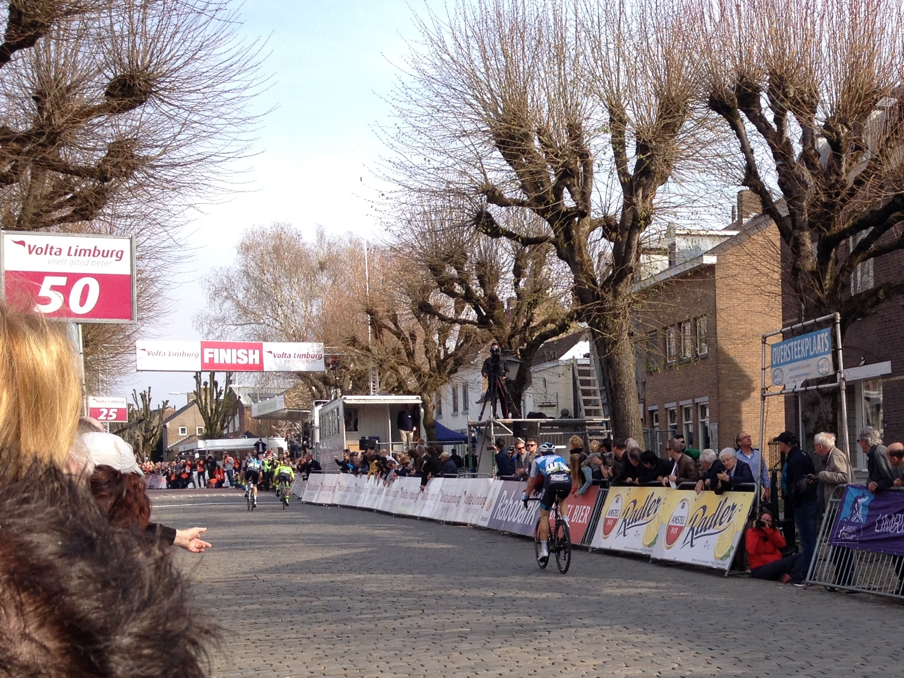 Volta Limburg Classic 2019 met start en finish in Eijsden, Limburg, Nederland